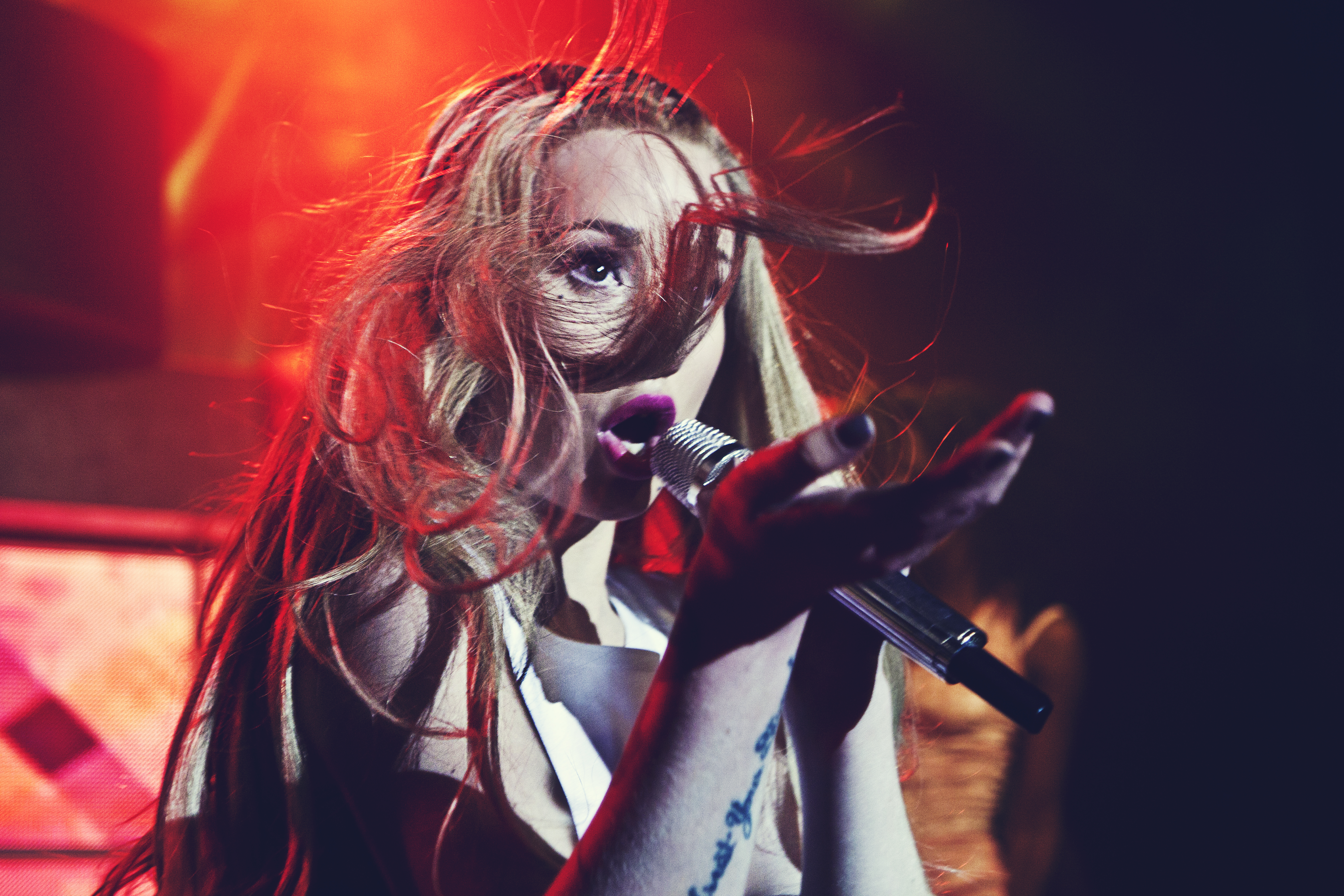 FOR USE